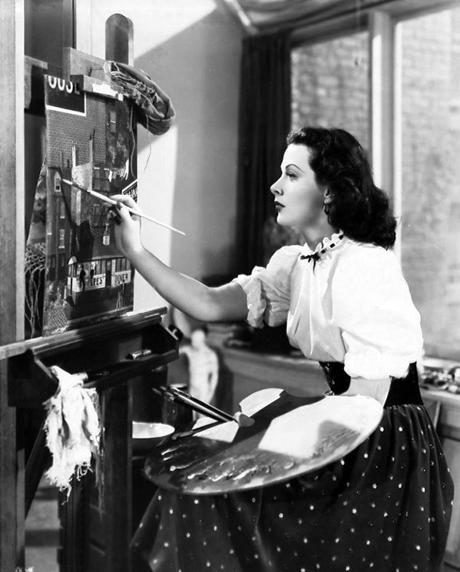 Hedy Lamarr in una scena del film Disonorata (Dishonored Lady, 1947) di Robert Stevenson